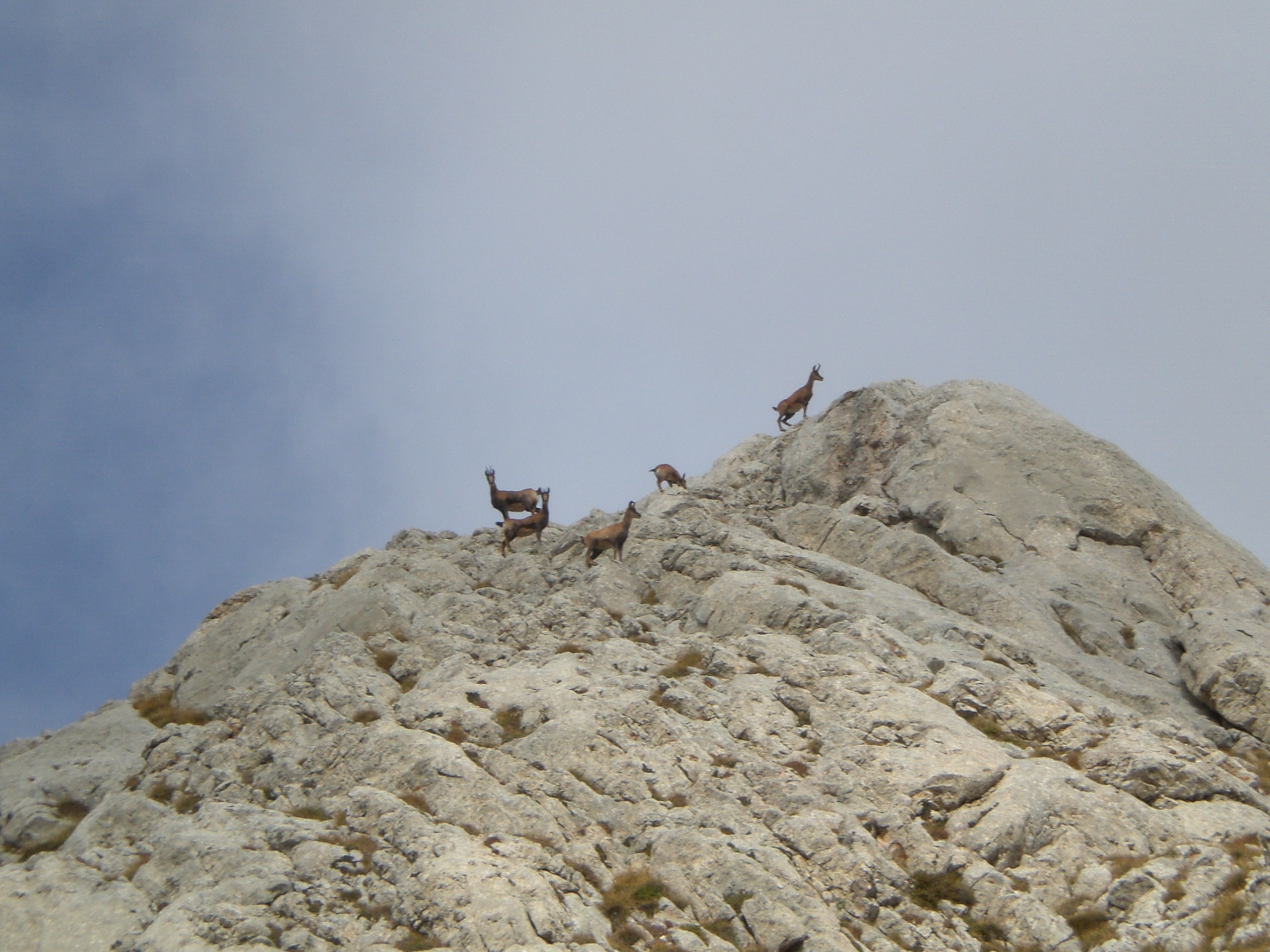 Isards al Pollegó Inferior, Massís del Pedraforca (octubre 2008)